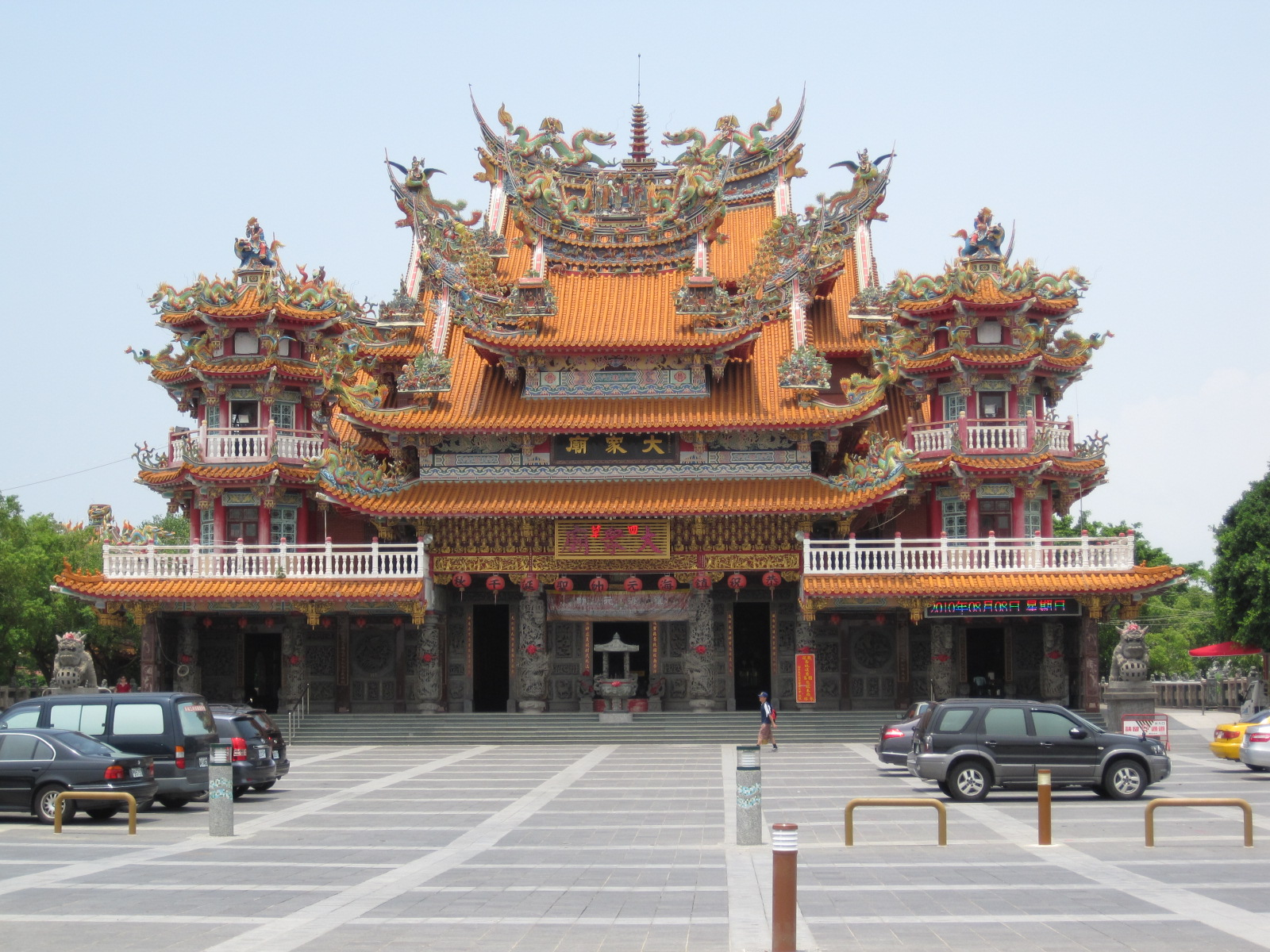 臺南市四草大眾廟